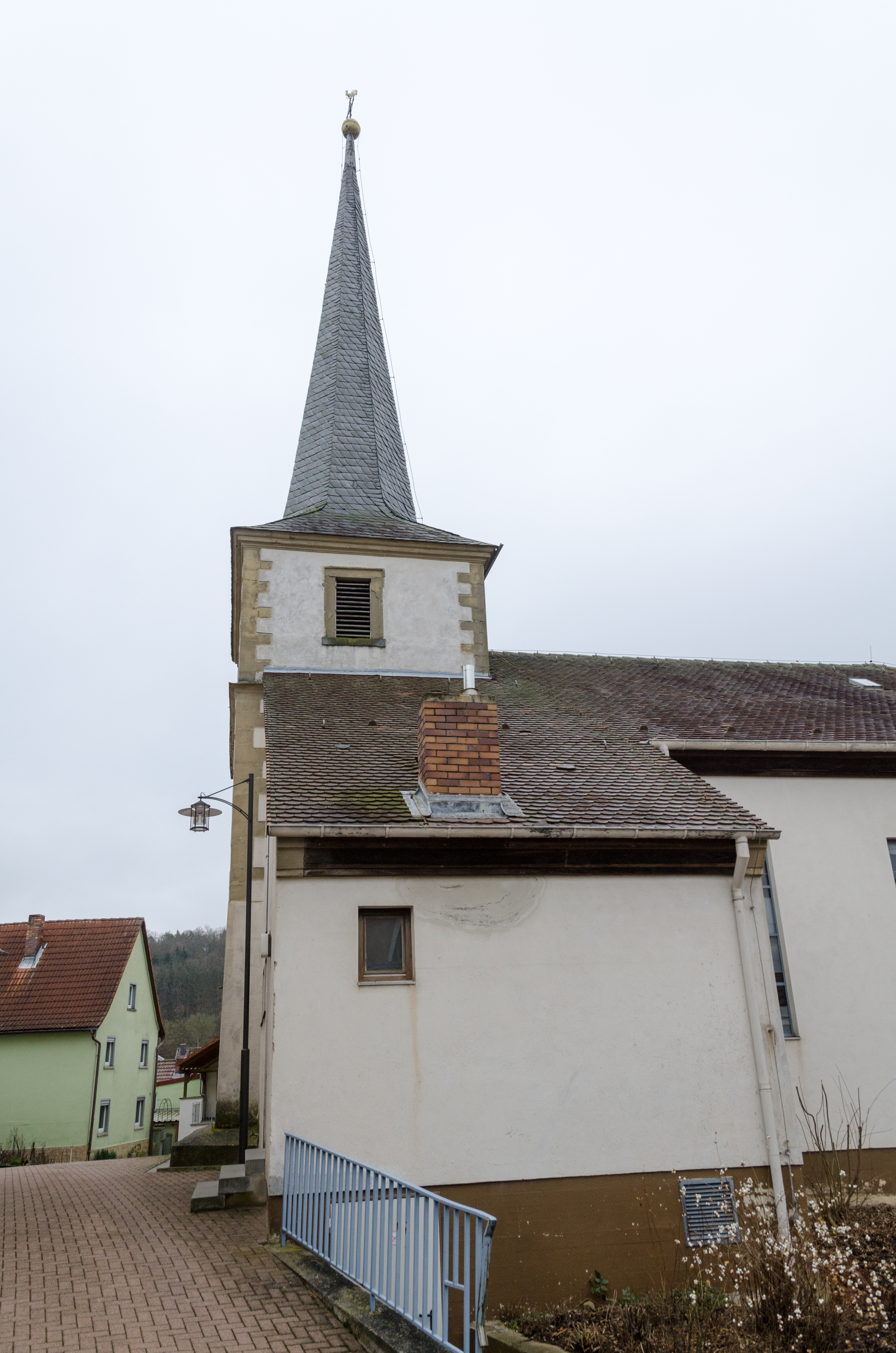 Thundorf, Theinfeld, Katholische Filialkirche St Matthias